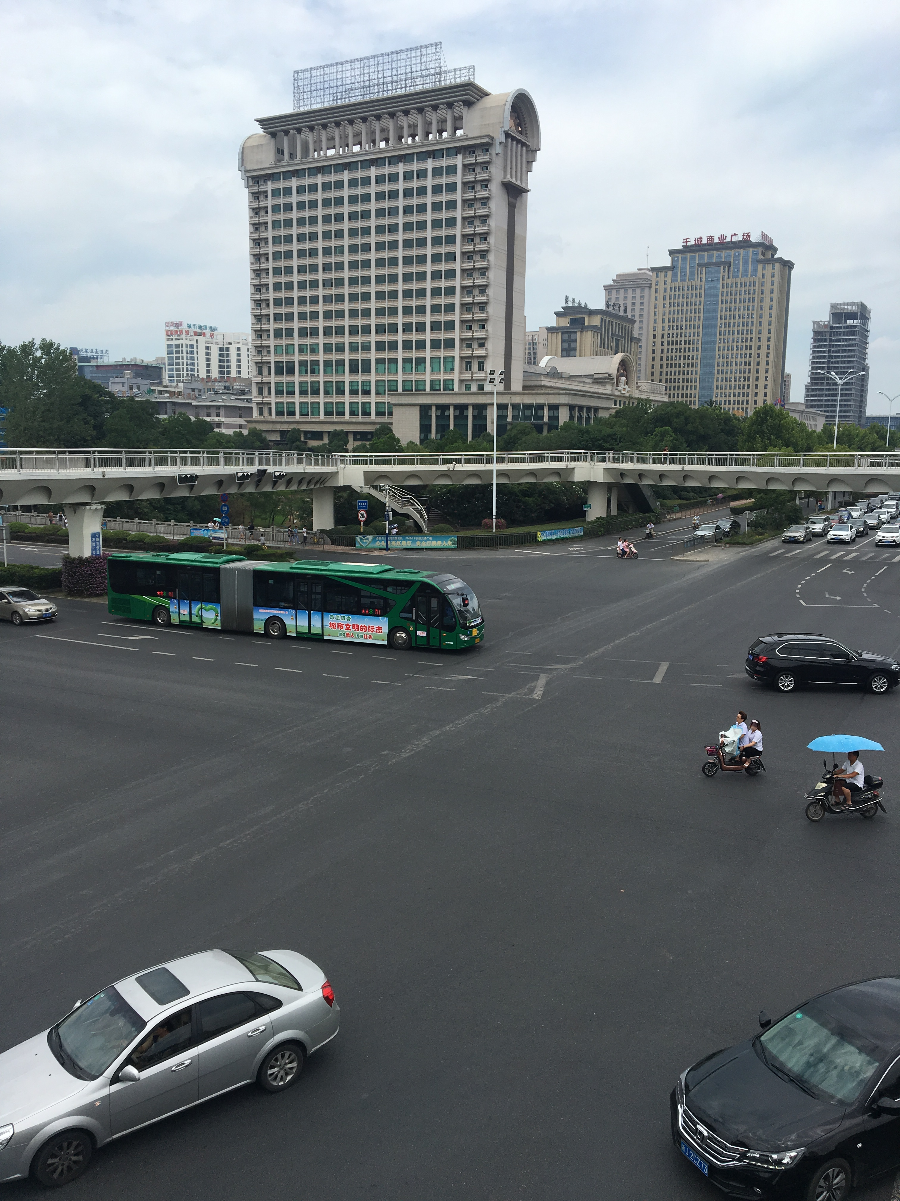 合肥公交B1路公交车，2017年7月，准备从紫云路左转